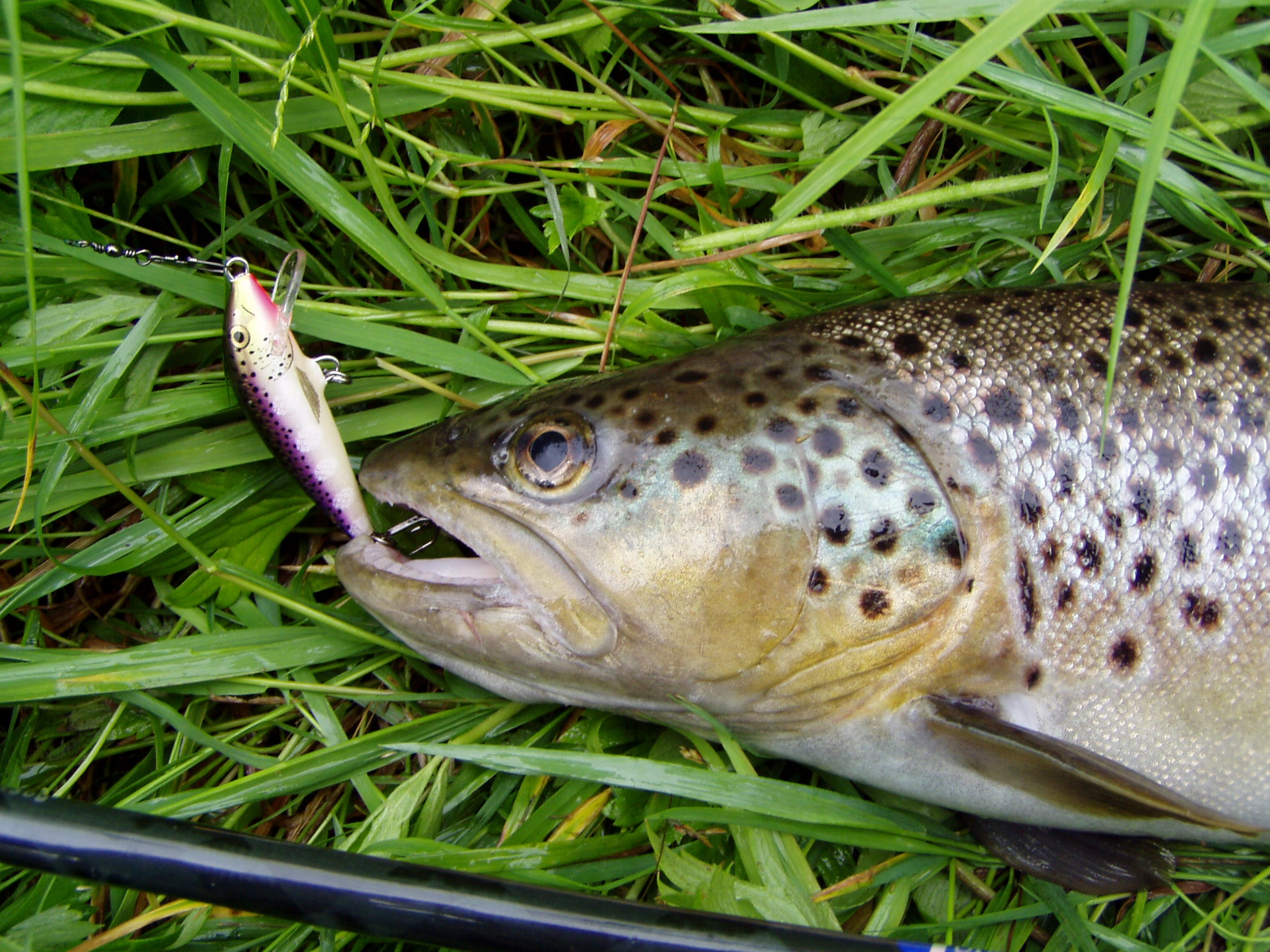 Pstruh Duhový